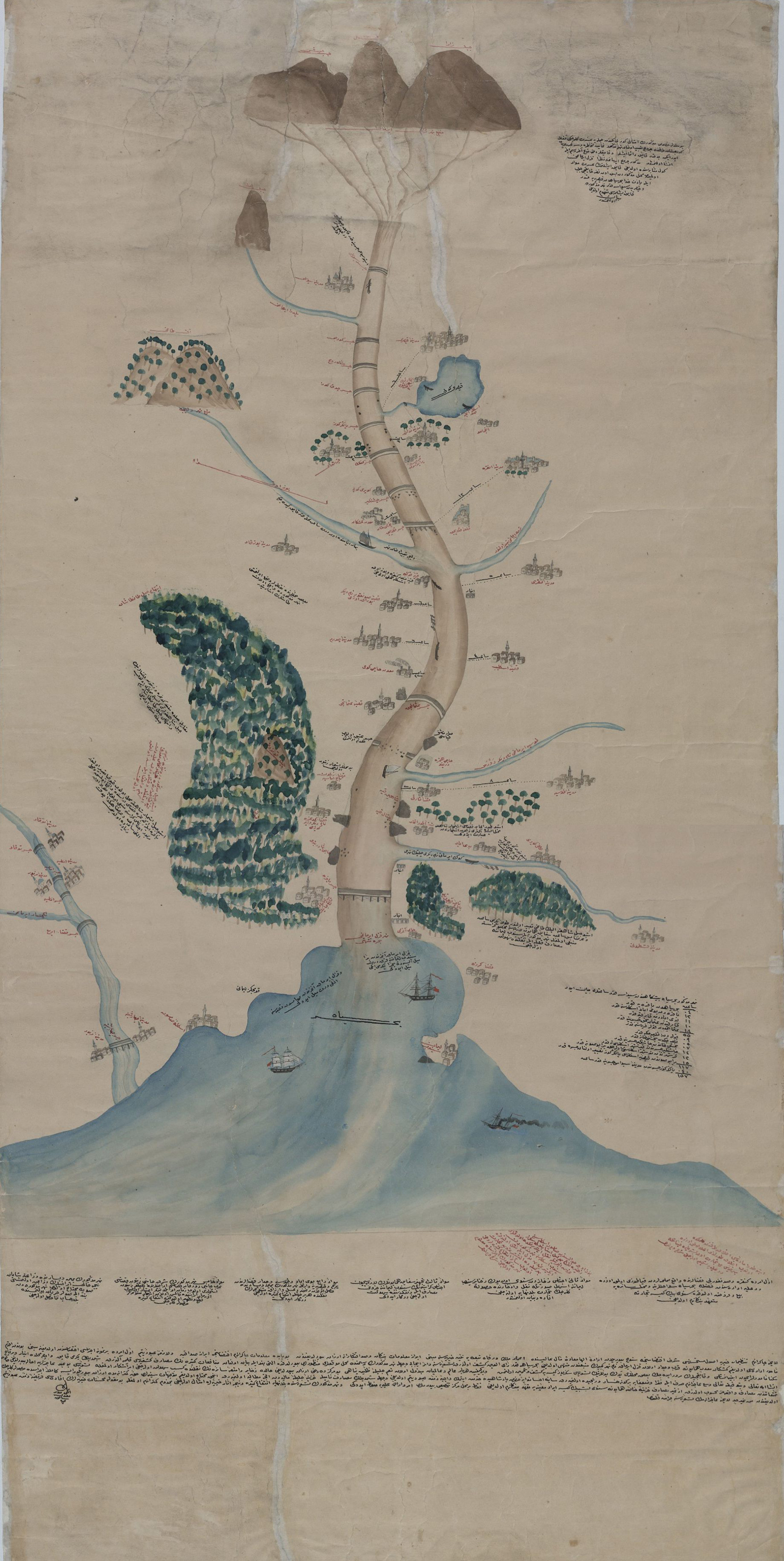 Kuzey Anadolu, Samsun ve Sinop civarı Kızılırmak kaynağına kadar yapılmış eski bir harita. Osmanlı Arşivlerinde HRT fon kodu ve 01.44 gömlek numarasıyla kayıtlıdır. Haritanın üst bölümünde bütün köprüler, ormanlık alanlar ve nakliye amacıyla kullanılan su vasıtalarının istasyonları bulunmaktadır. Alt bölümde ise Samsun İskelesi, Bafra ve Çarşamba'da yol olarak kullanılan Kızılırmak ve Yeşilırmak nehirleri yer almaktadır. Mustafa Kemal'in 1919'da kullandığı Samsun-Amasya-Tokat-Sivas karayolu yapılmadan önce iç bölgelerle ulaşım Kızılırmak ve Yeşilırmak üzerinden sağlanmaktaydı. Bu haritada da bu su yolu güzergahı yer almaktadır.